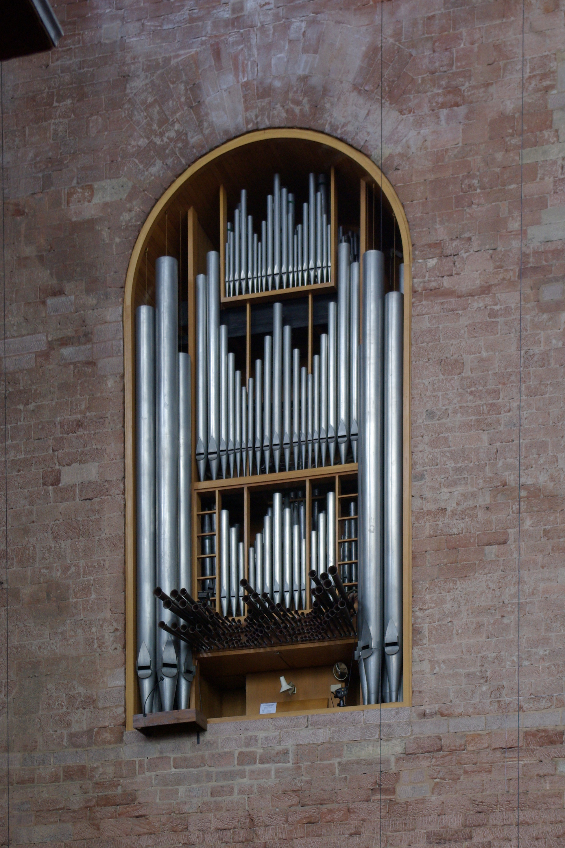 Trier, Kontantinbasilika, Orgel